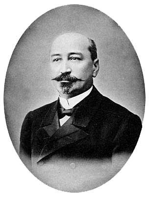 Коновалов, Дмитрий Петрович